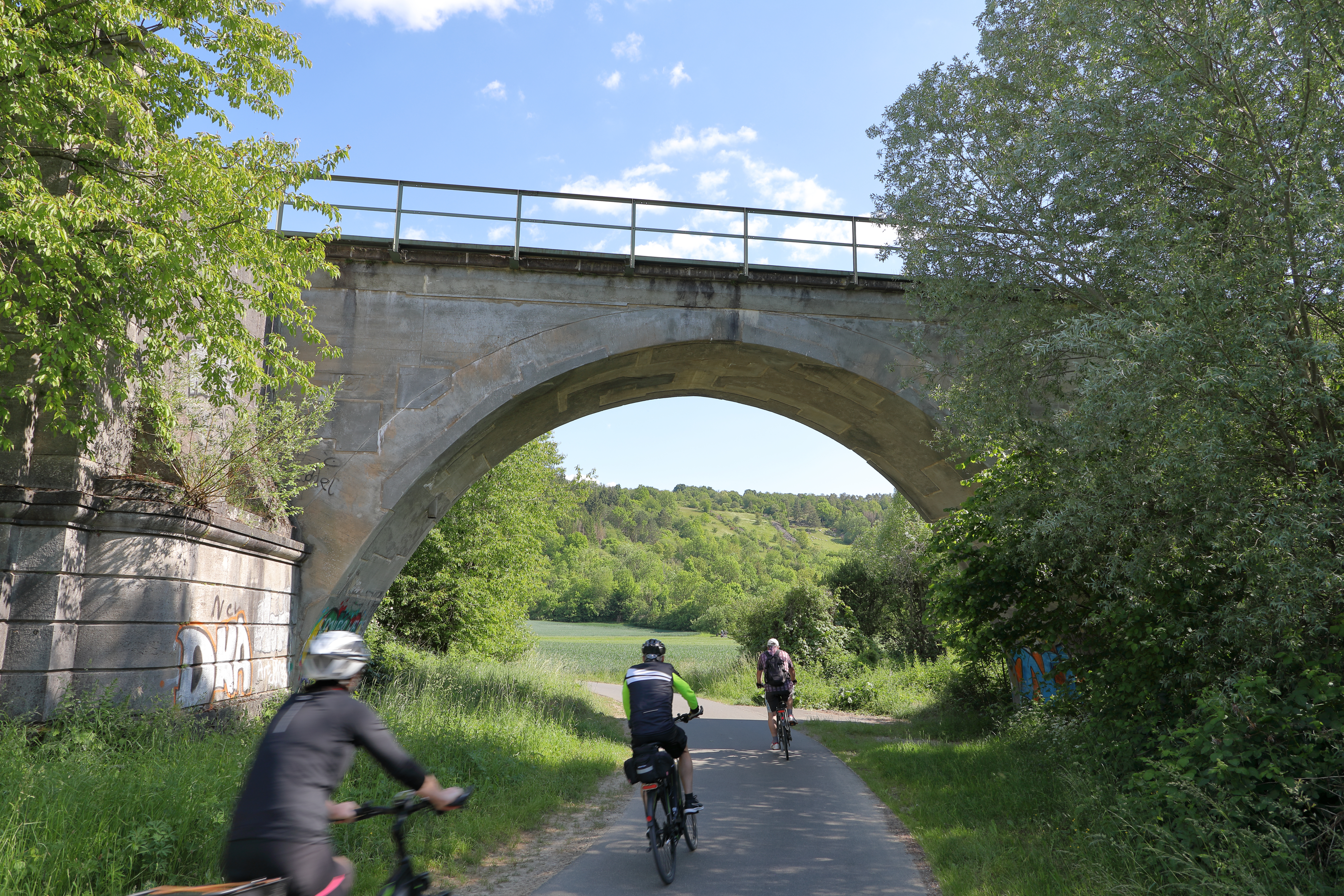 Die Eisenbahnbrücke Weikersheim überquert den Fluss Tauber und den Taubertalradweg bei Weikersheim.